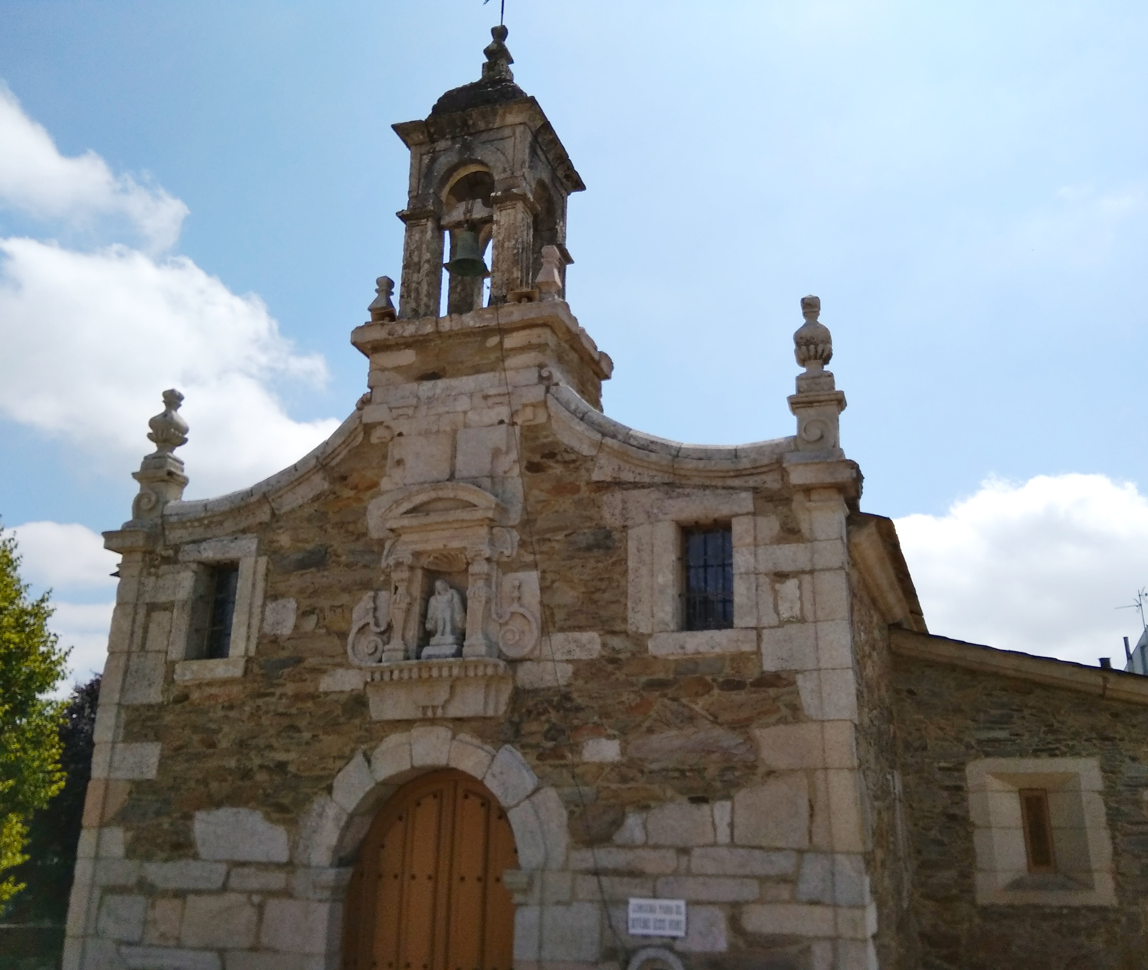 Capela do Ecce Homo na parroquia Santiago de Rubián, concello de Bóveda (Lugo)